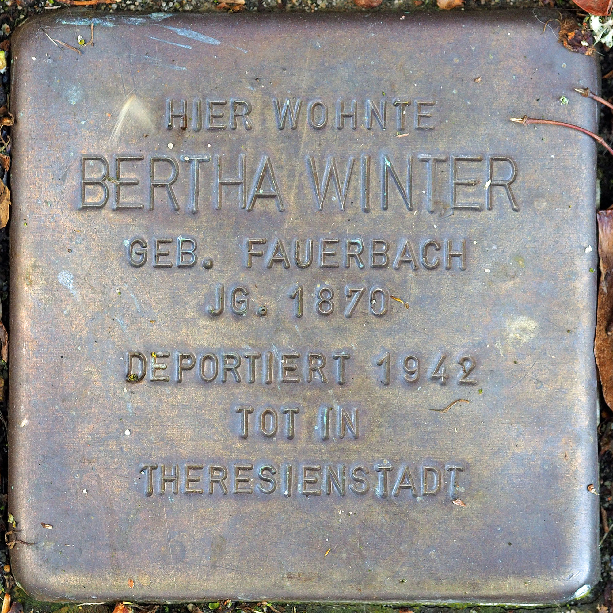 Stolpersteine MG: Winter, Bertha